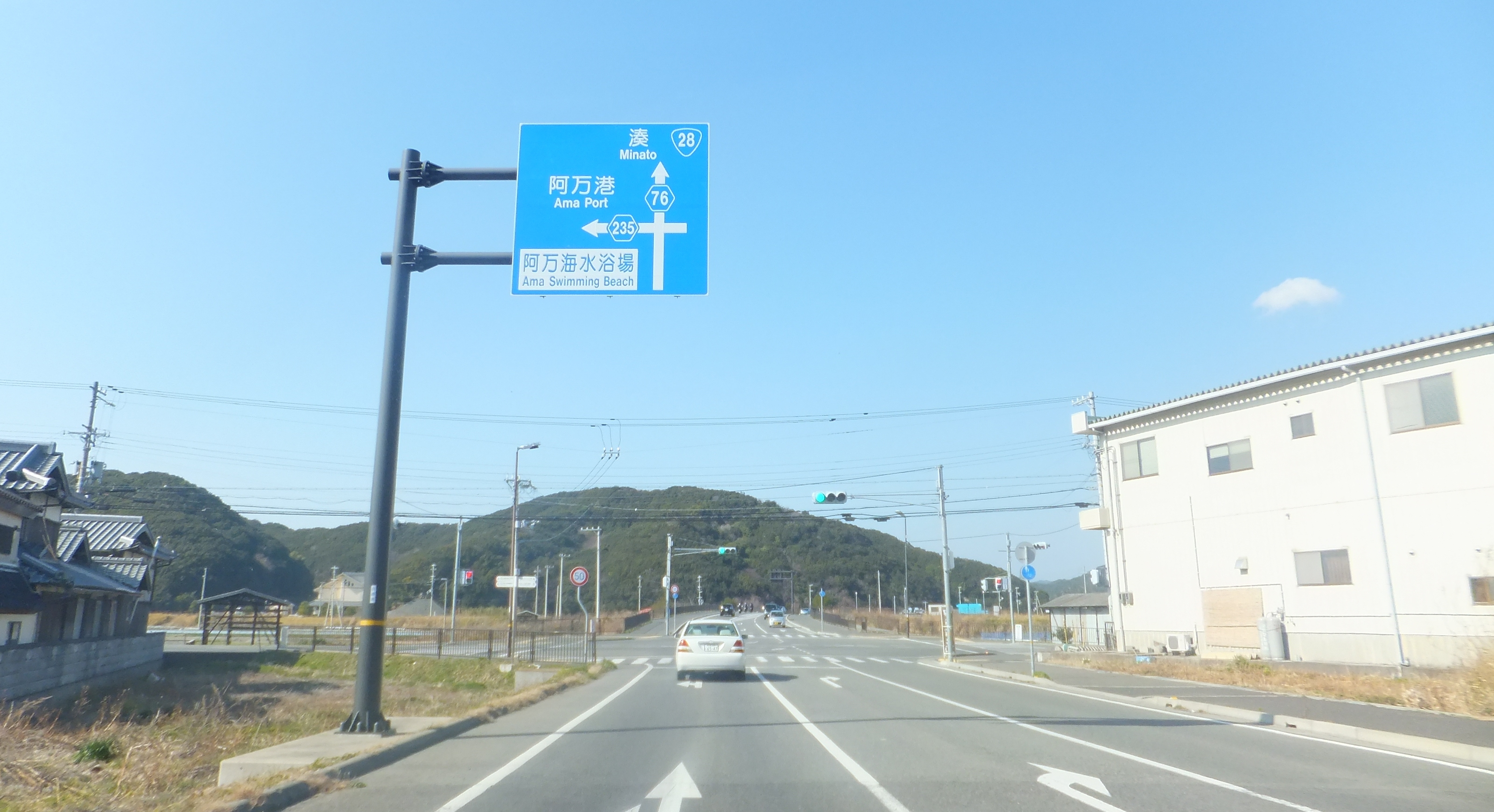 兵庫県南あわじ市阿万西町 兵庫県道76号洲本灘賀集線